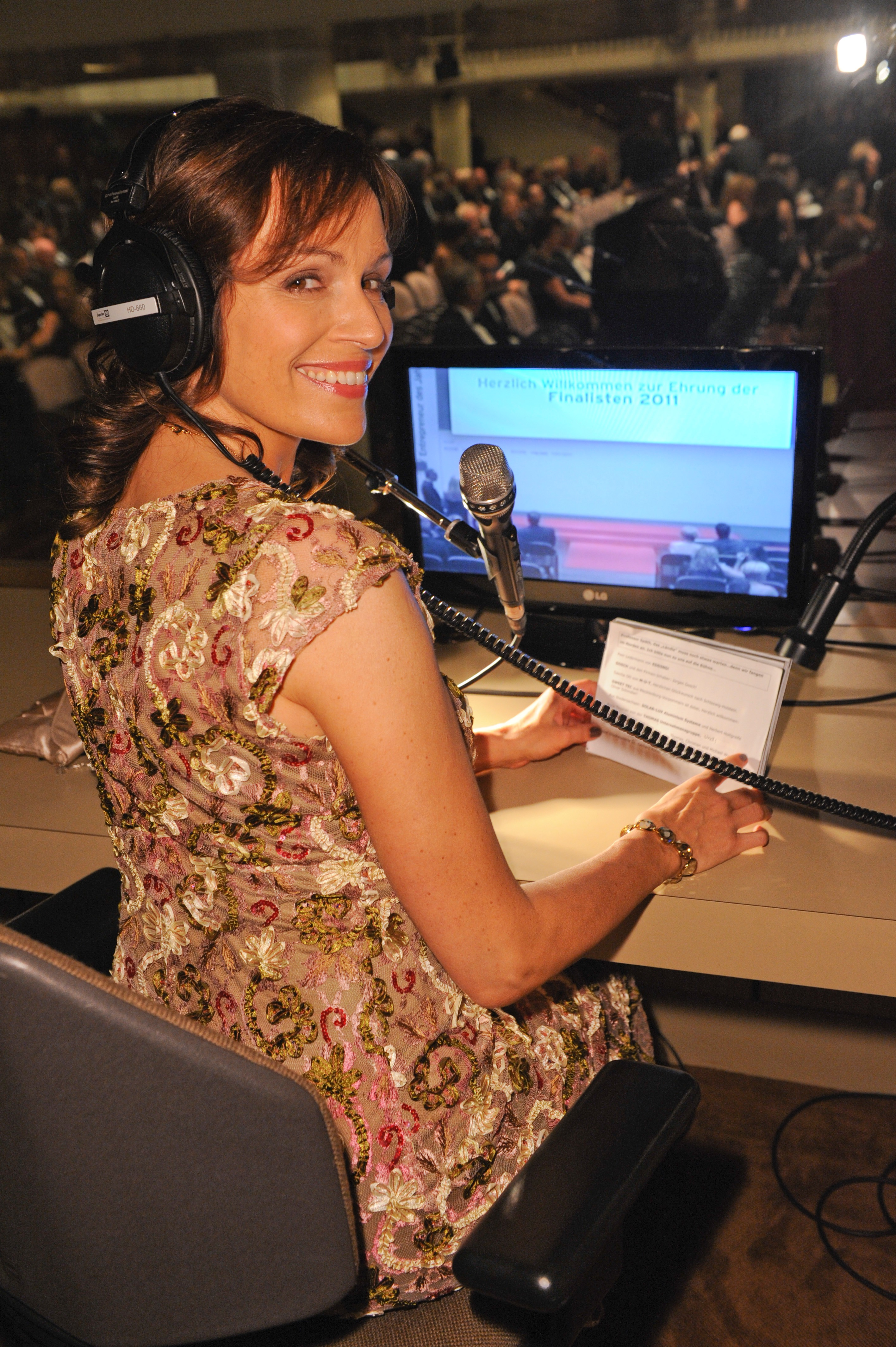 "Karin Kuschik ist eine der besten Eventmoderatorinnen Deutschlands und vor allem dann gefragt, wenn es um Charme, journalistische Kompetenz und Spontanität geht."